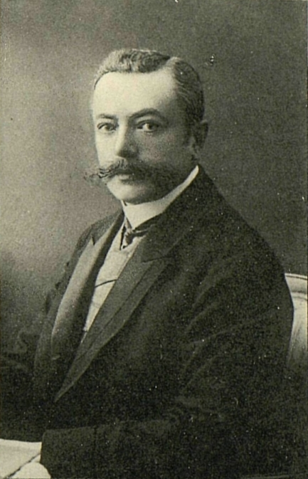 Николай Николаевич Лавриновский, депутат Государственной Думы Российской империи